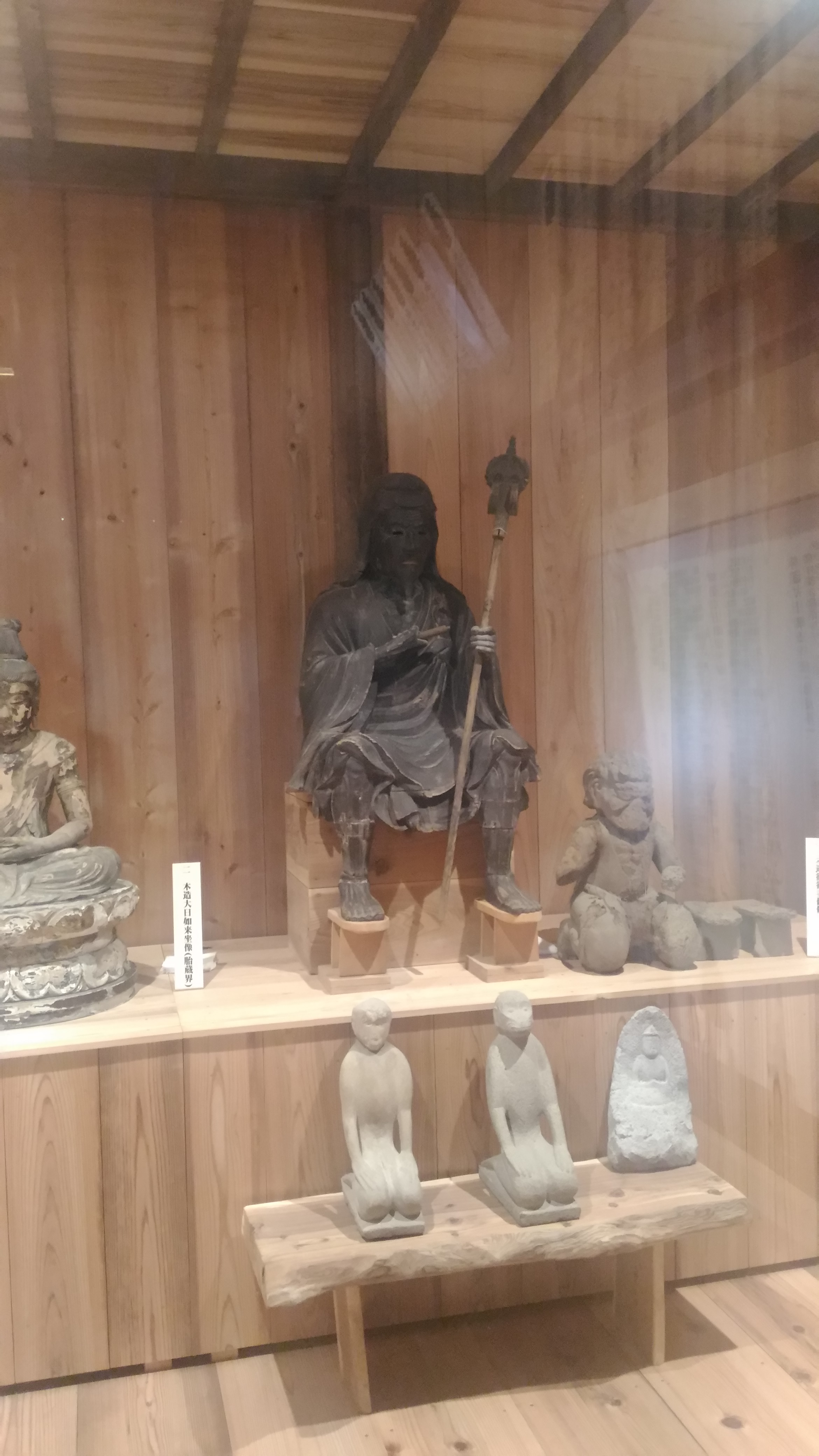 村山浅間神社大日堂の役小角像